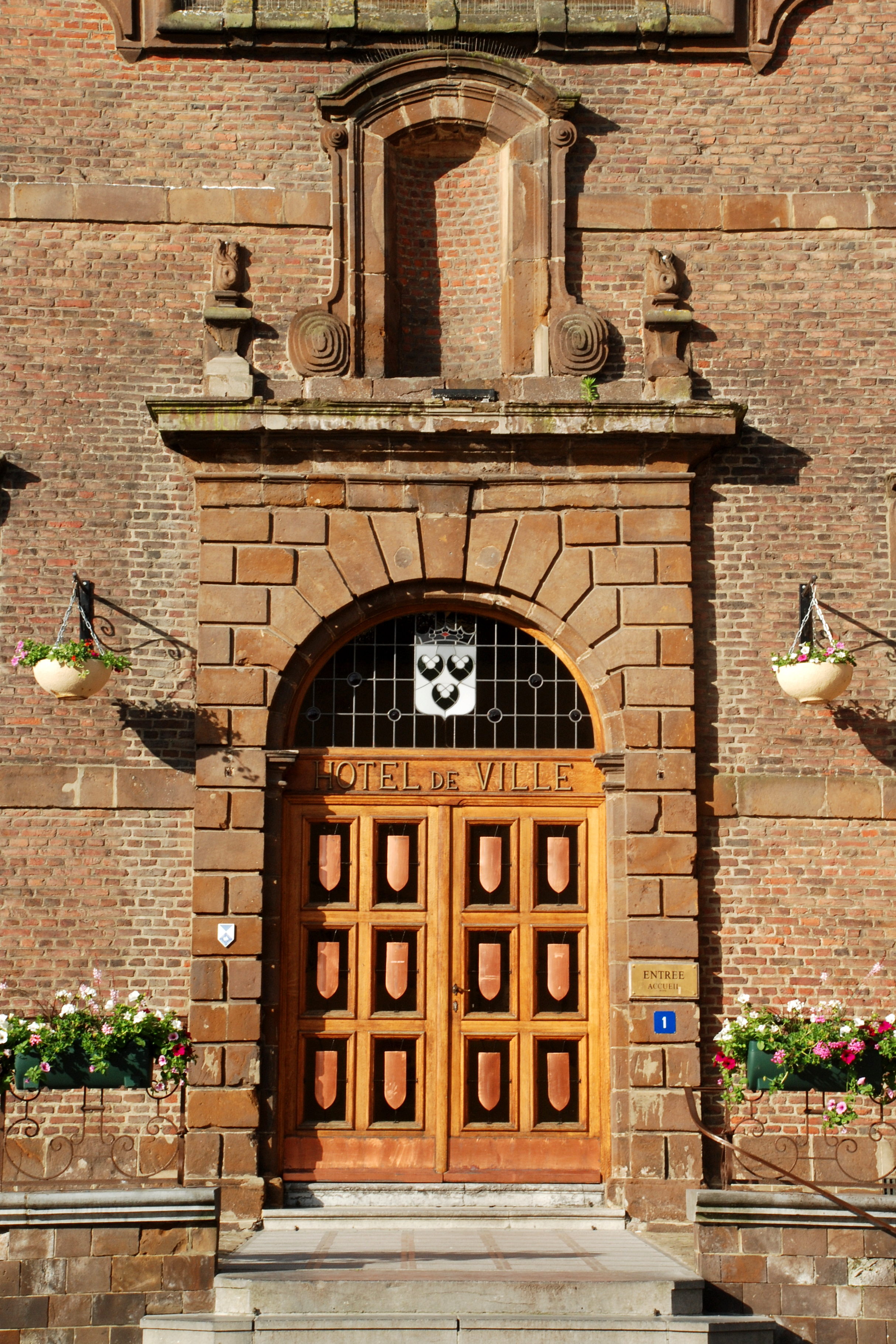 Belgique - Wallonie - Wavre - Ancien couvent des Carmes Chaussés (actuel hôtel de ville)